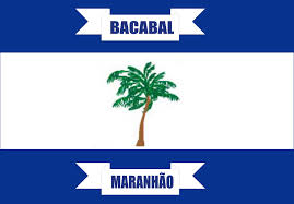 Bandeira do Município de Bacabal - MA